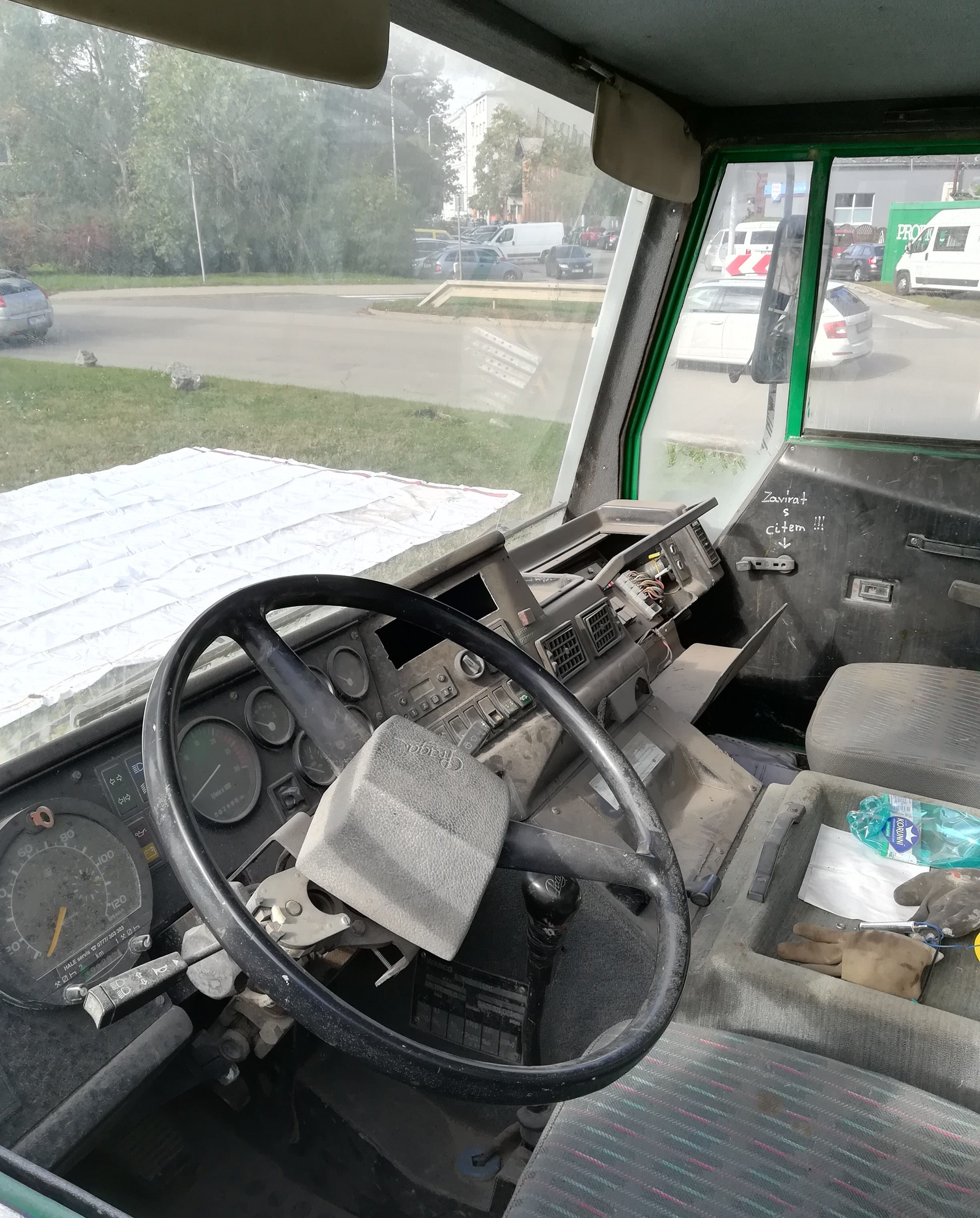 Praga UV 80, interiér.